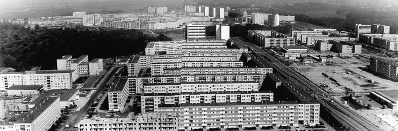 Schwerin, Großer Dreesch, Wohnungsbau ADN-ZB Pätzold-3-6-1982 Schwerin: 1972 wurde Schwerin mit 100000 Bürgern zur Großstadt. Heute hat sie bereits 122000 Einwohner. Noch in diesem Fünfjahrplan wird das größte Neubaugebiet im Bezirk, der Große Dreesch im südlichen Teil der Bezirkshauptstadt, fertiggestellt. 60000 Bürger werden dann hier wohnen. (siehe auch 8 N) Information added by Wikimedia users.